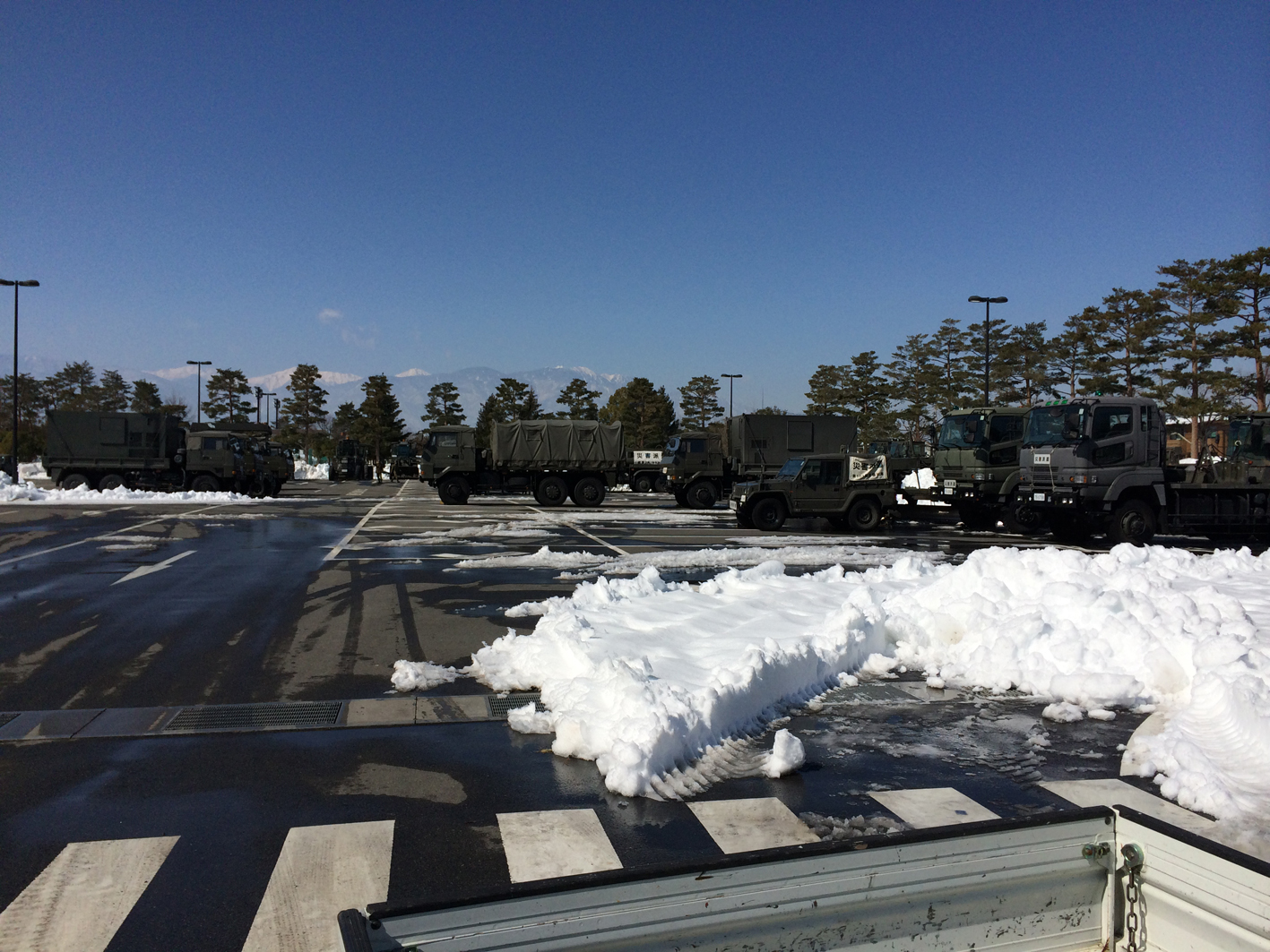 災害派遣をのため小瀬スポーツ公園に集結した陸上自衛隊第1師団の車両